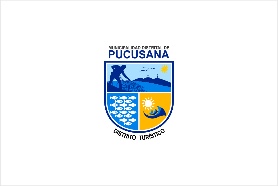 Bandera del Distrito de Pucusana